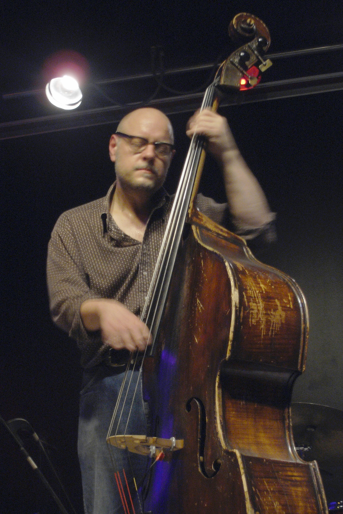 Kent Kessler